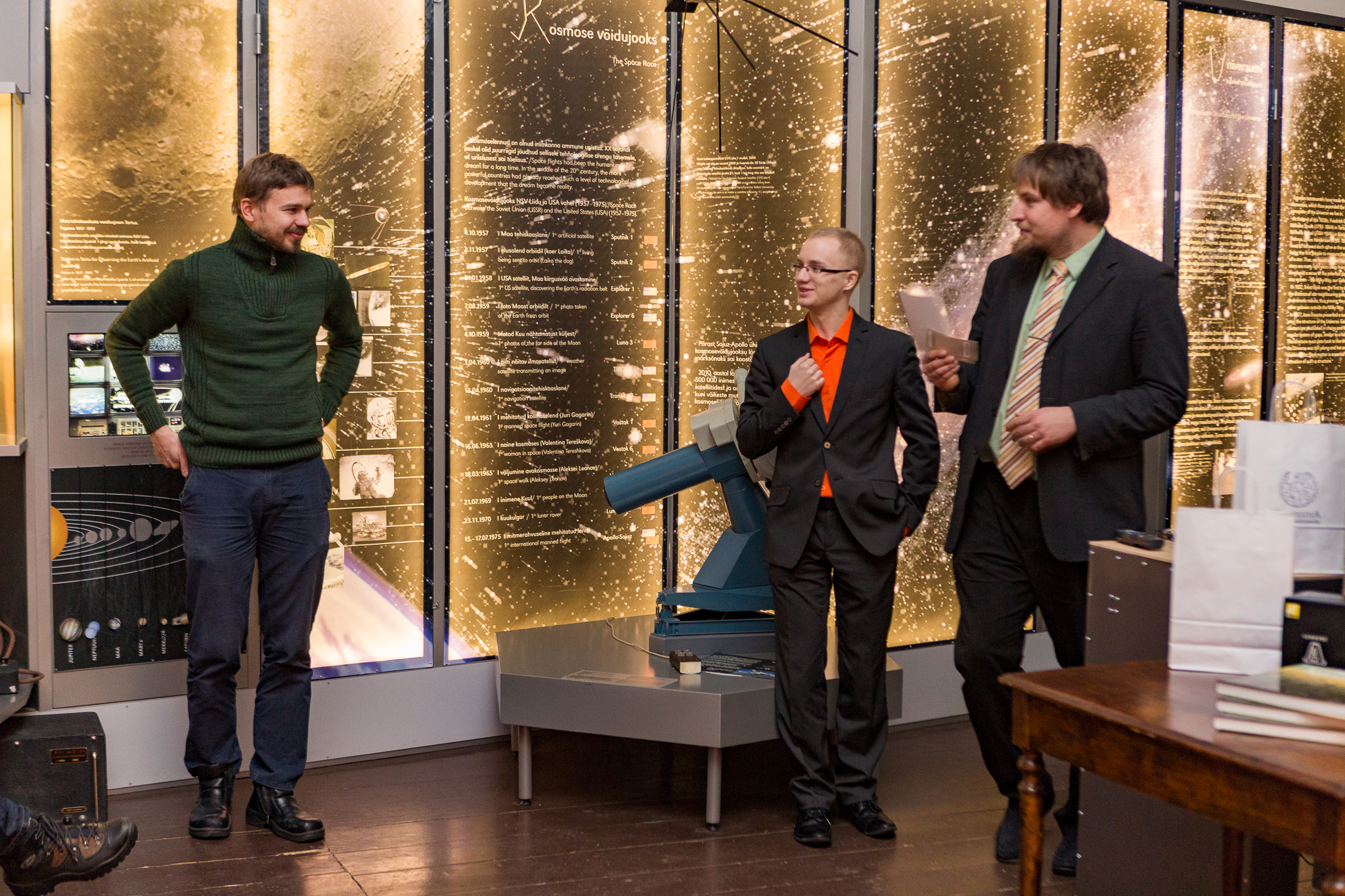 Teadusfoto 2015 lõpetamine Tartu Tähetornis.